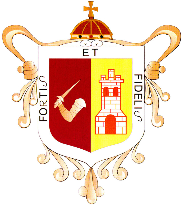 Escudo de Zamora de Hidalgo, MIchoacan, MX.